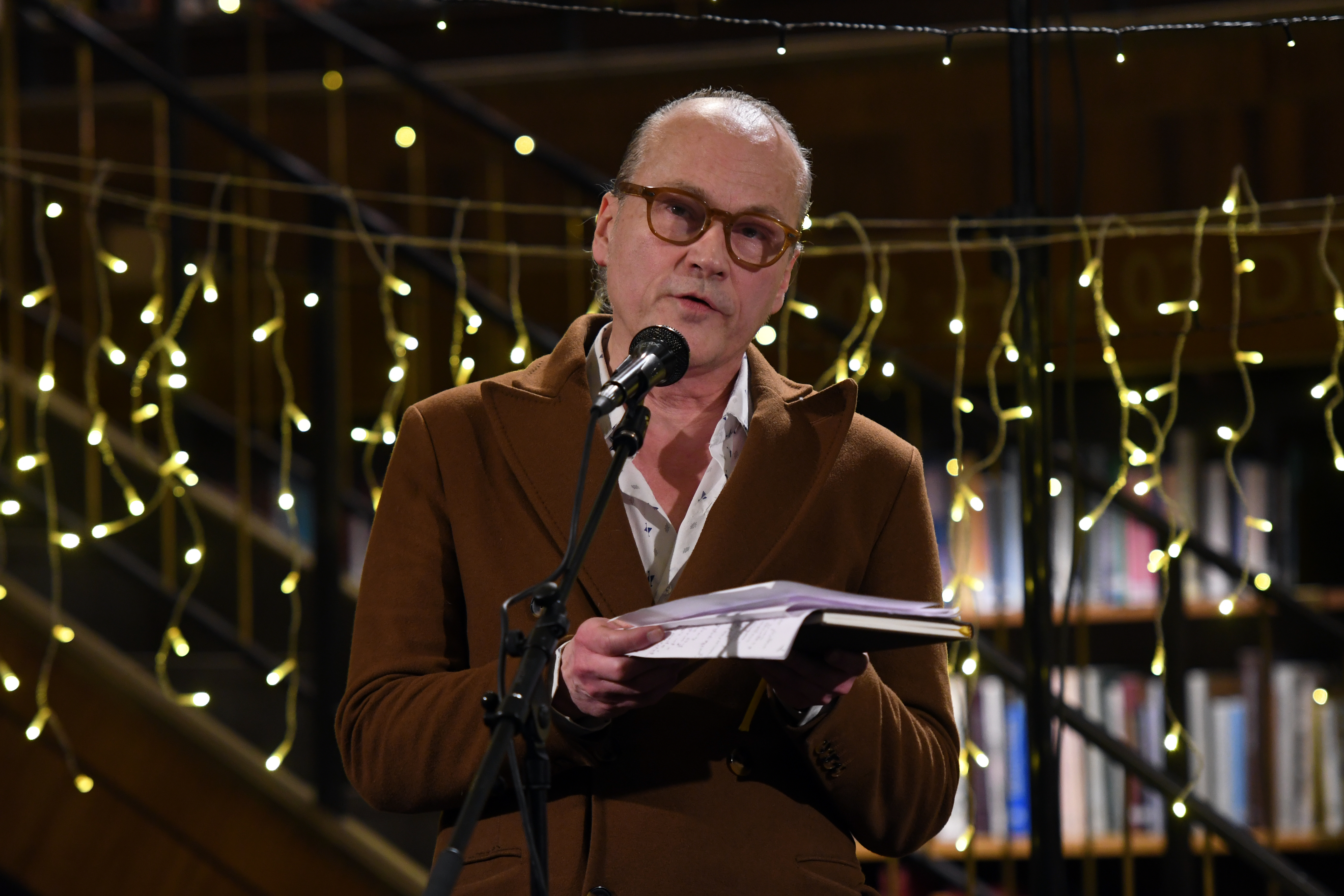 Poesimässan 2019, Stockholms stadsbibliotek. Håkan Sandell.